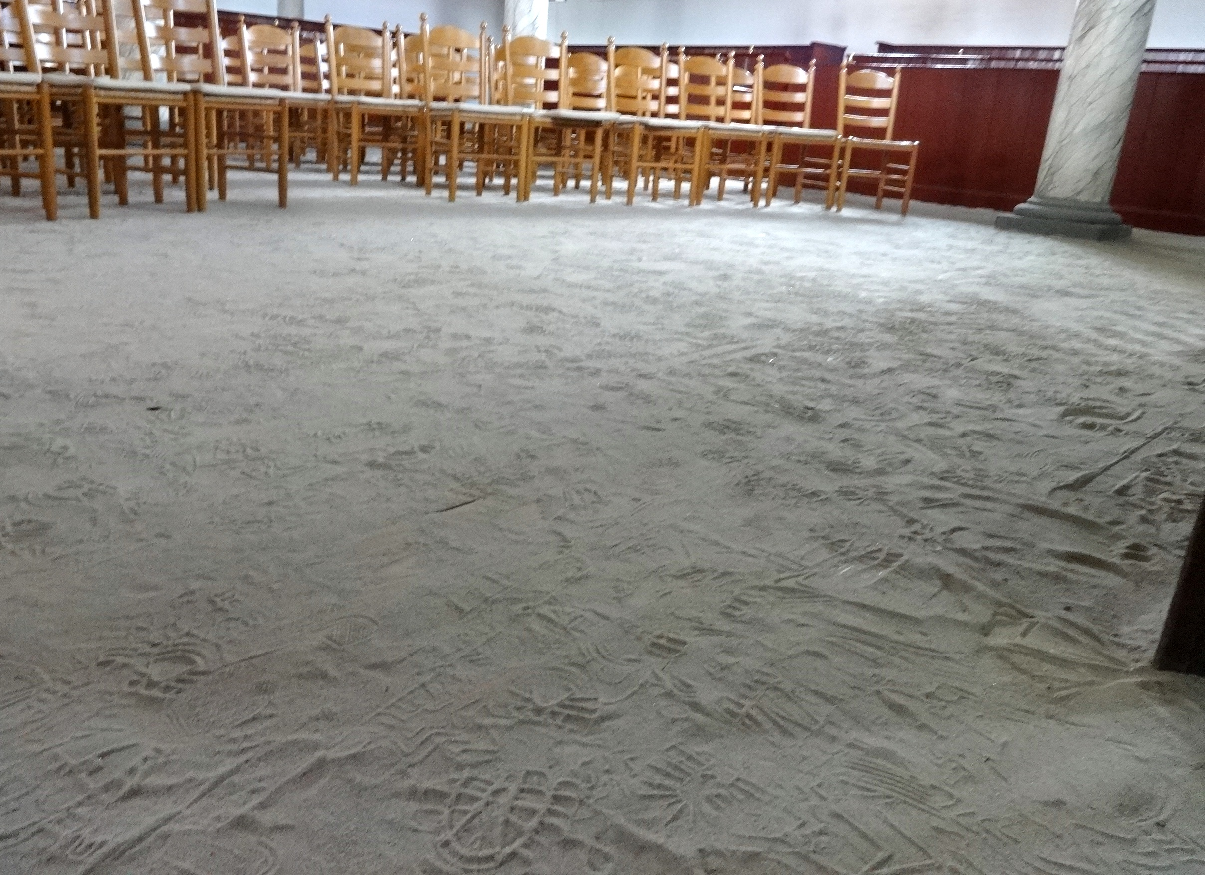 Remonstrantse kerk Alkmaar, floor with sand